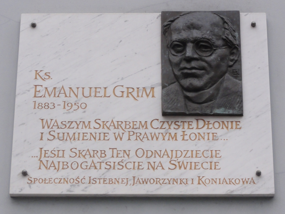 Tabliczka upamiętniająca Emanuela Grima na budynku plebani w Istebnej